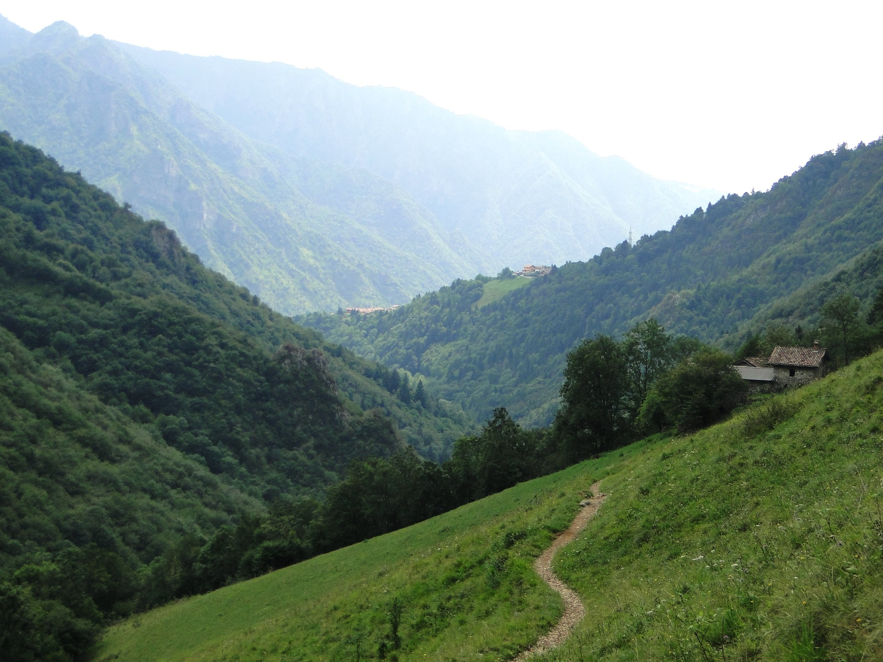 Bassa val Dossana, Prealpi bergamasche (BG)